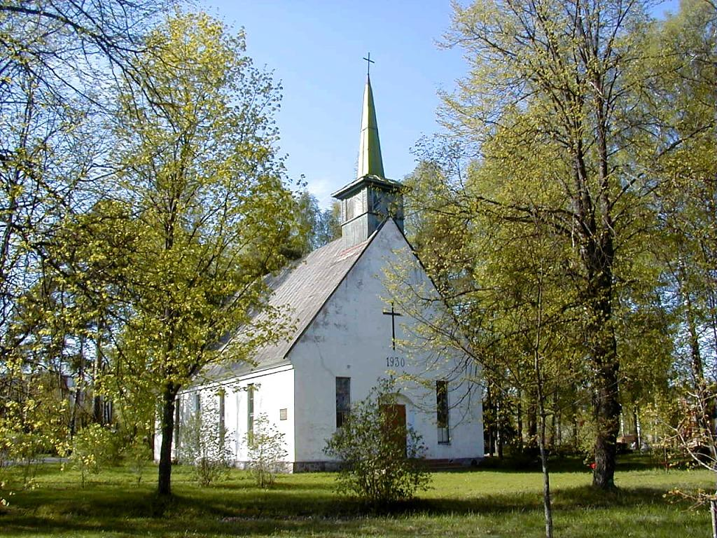 Staiceles baznīca. 2000-04-29